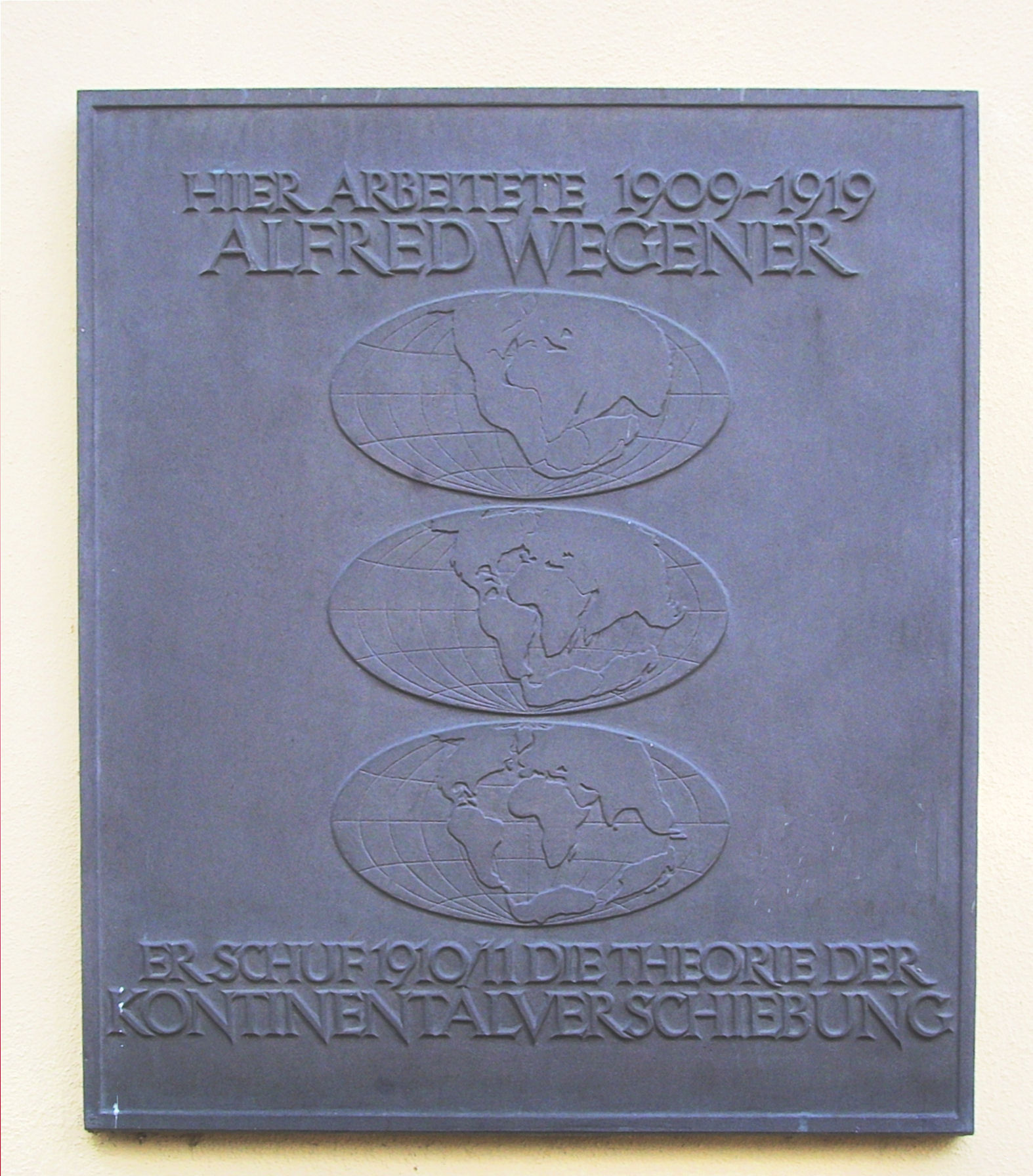 Marburg: Gedenktafel für Alfred Wegener in der Straße "Renthof", der von 1908 bis 1919 in Marburg tätig war und hier die Theorie der Kontinentalverschiedung entwickelte.